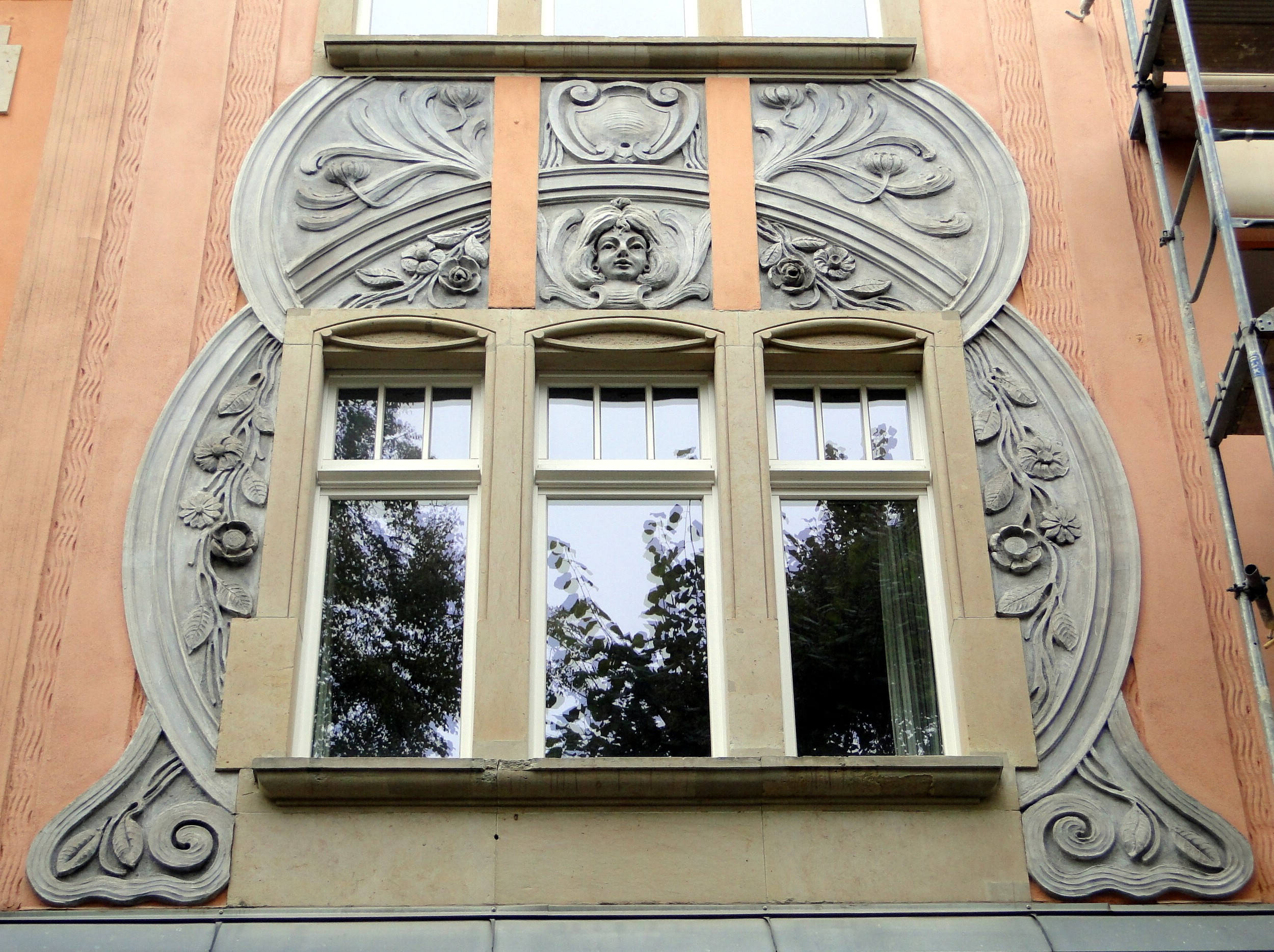 Mievilla Reinickstraße 10, Detail